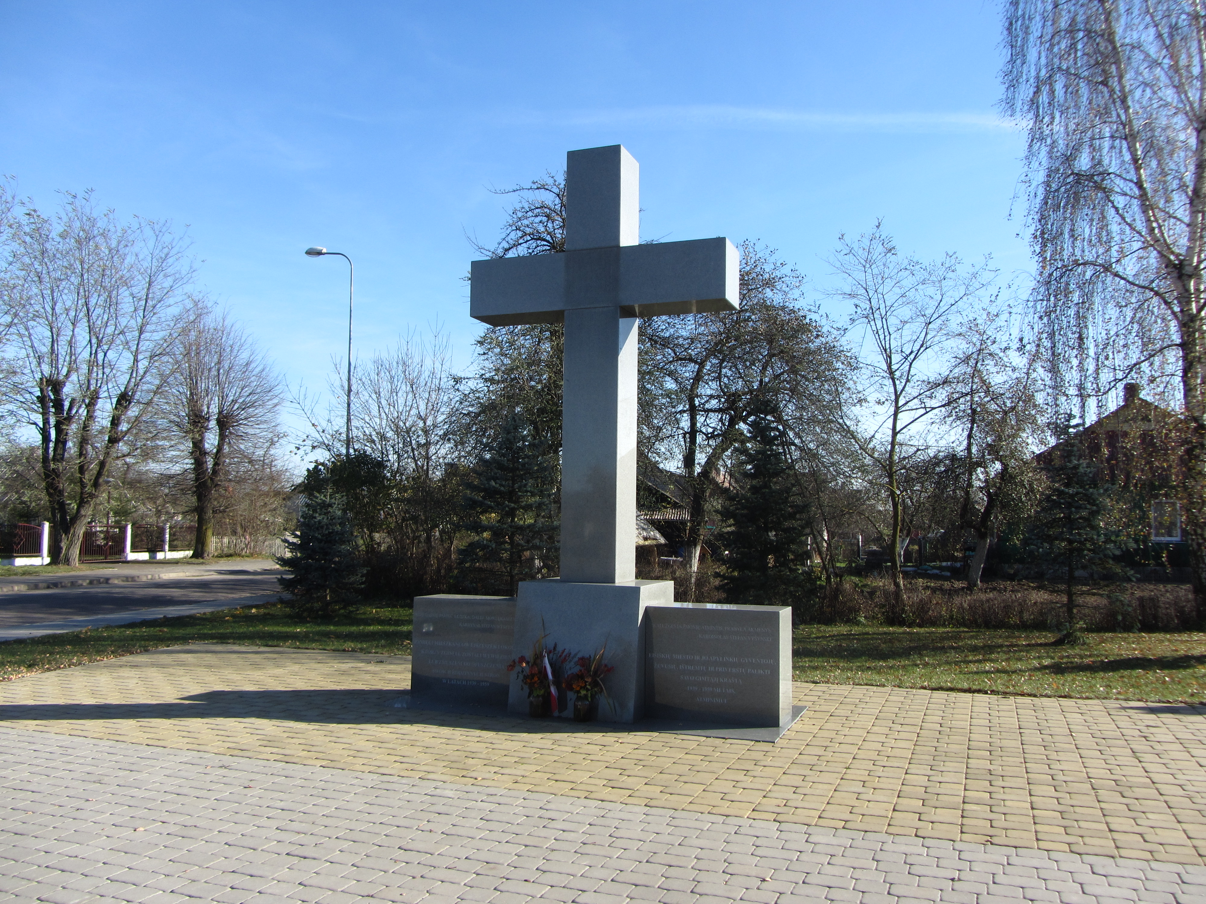 Eišiškės, Lithuania